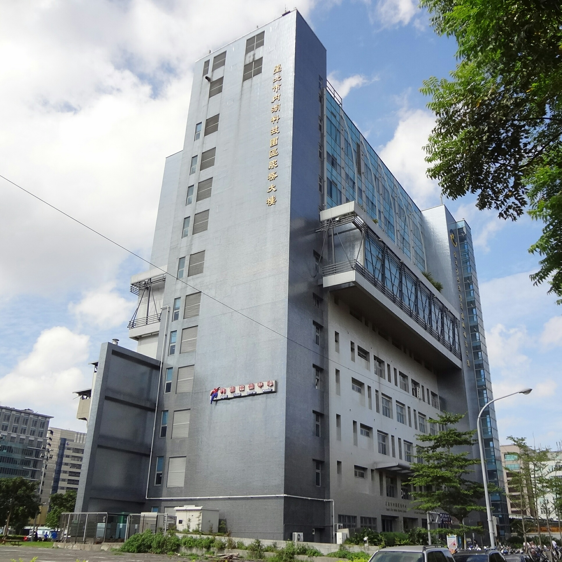 臺北市內湖科技園區服務大樓，位於臺北市內湖區洲子街12號。